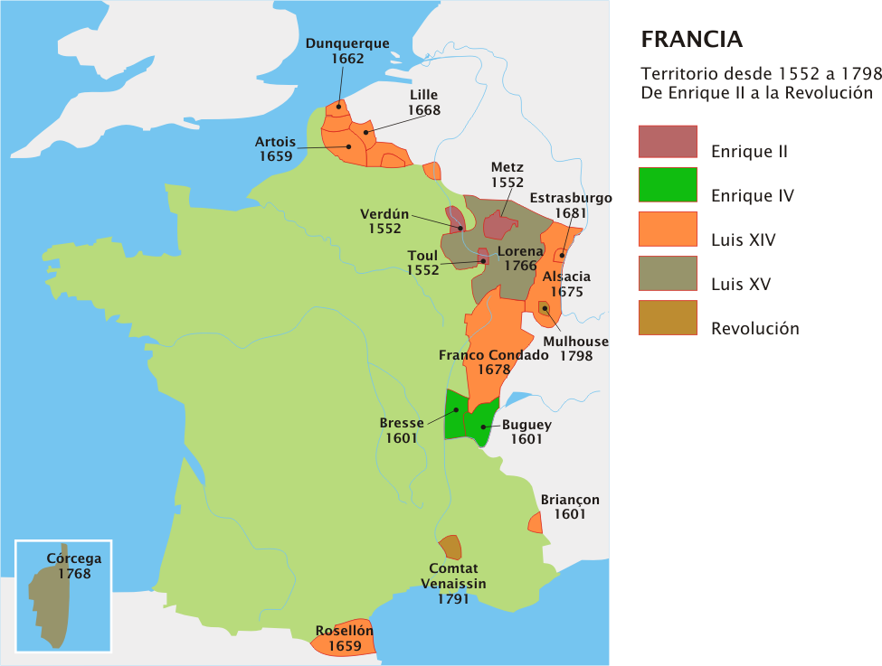 Mapa evolutivo del territorio francés entre 1552 y 1798. Versión en español.